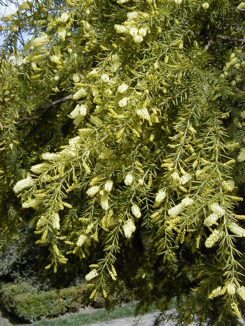 Acacia verticillata. Real Jardín Botánico, Madrid.